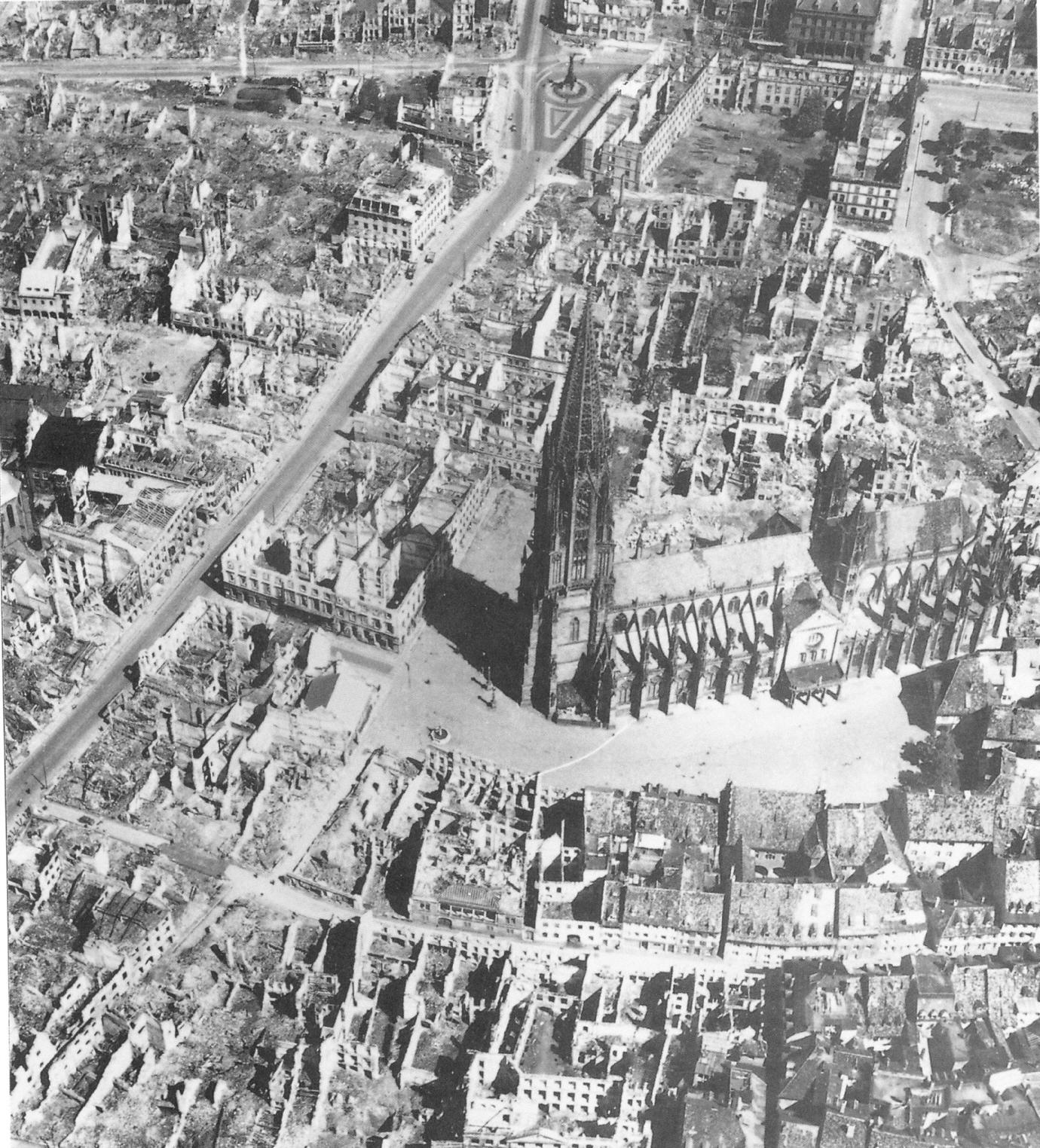 Luftaufnahme von Freiburg von Süden nach dem Angriff vom November 1944